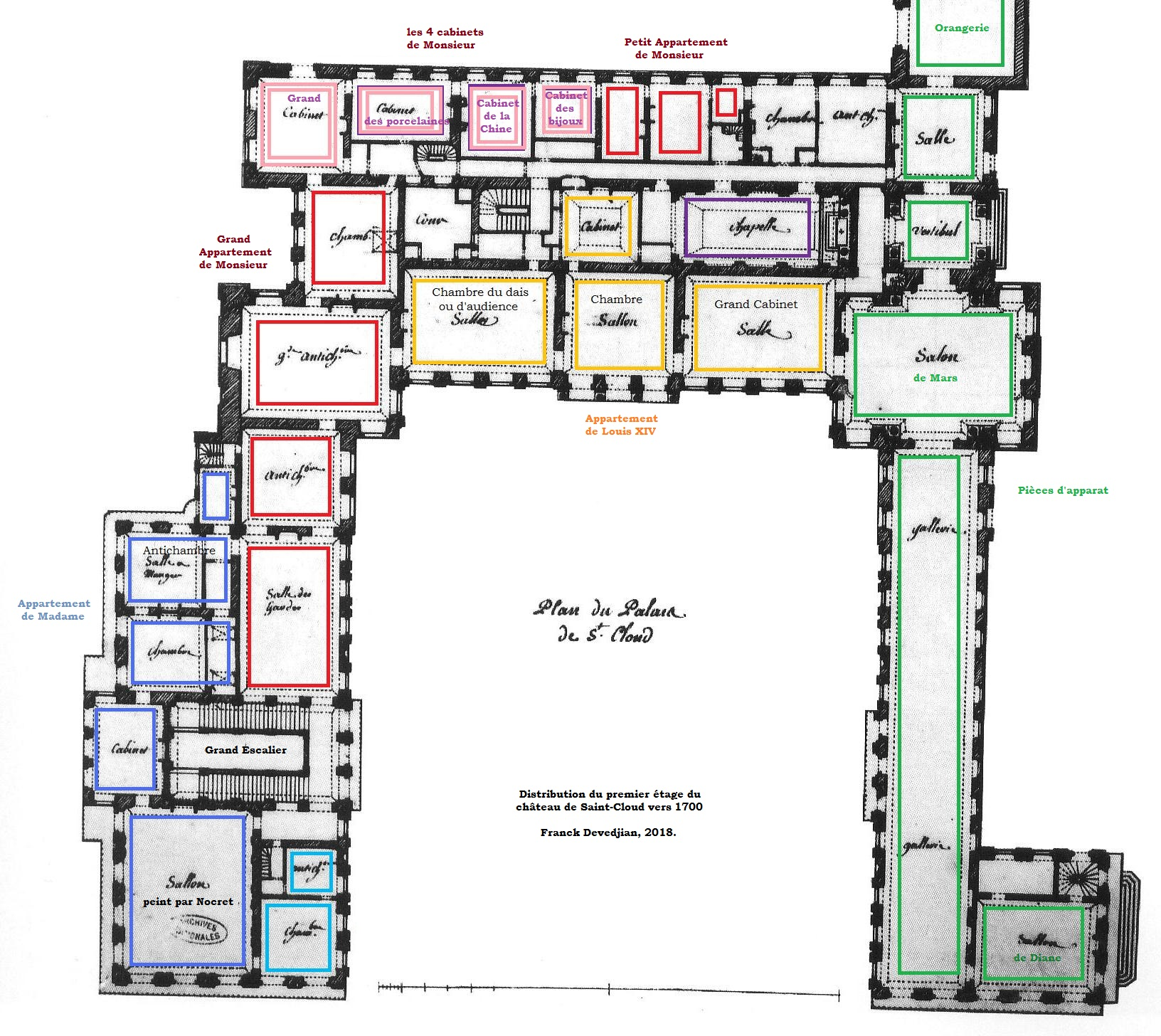 Distribution du premier étage du château de Saint-Cloud vers 1700.